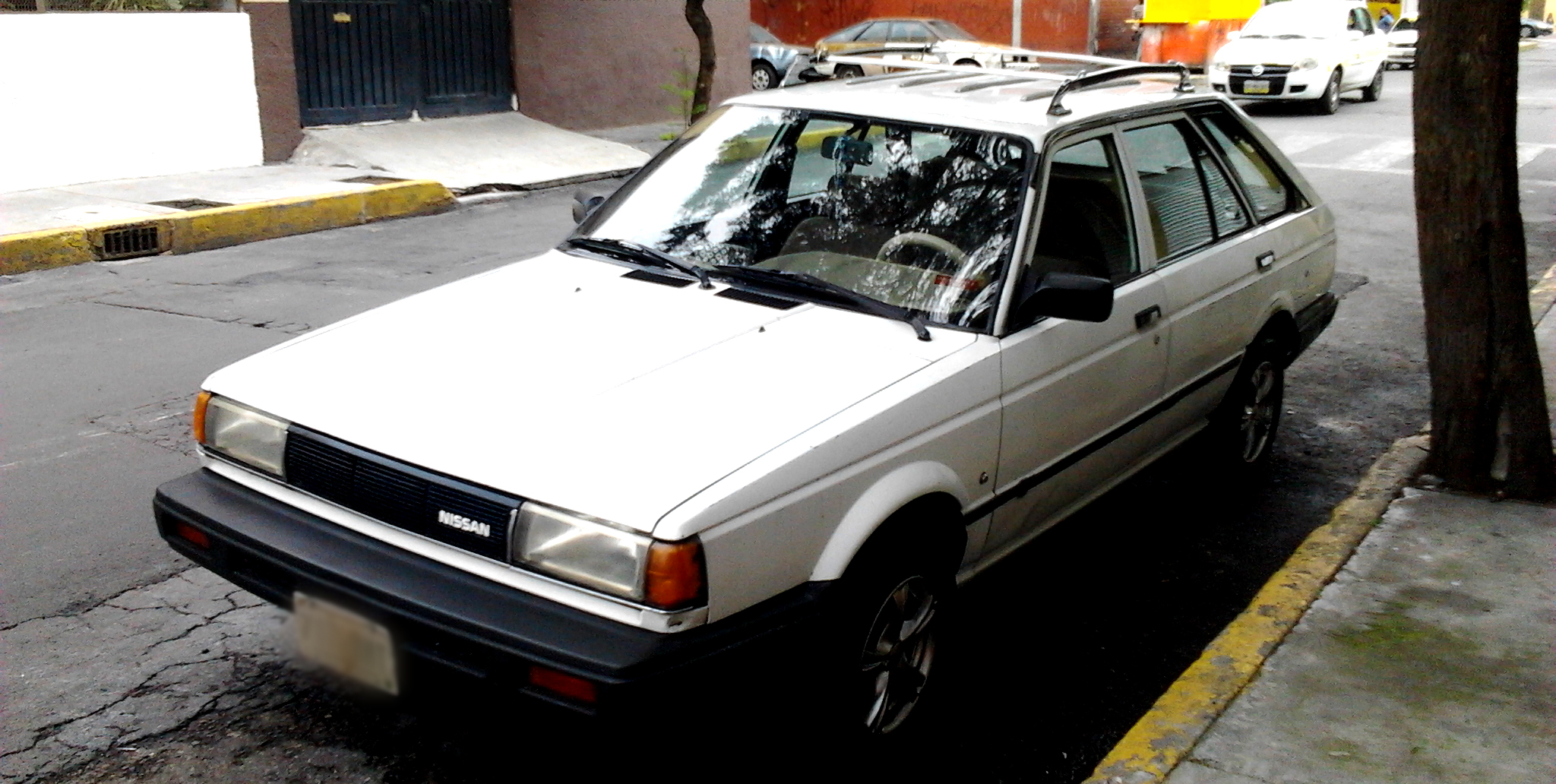 En México es uno de los autos mas comerciales